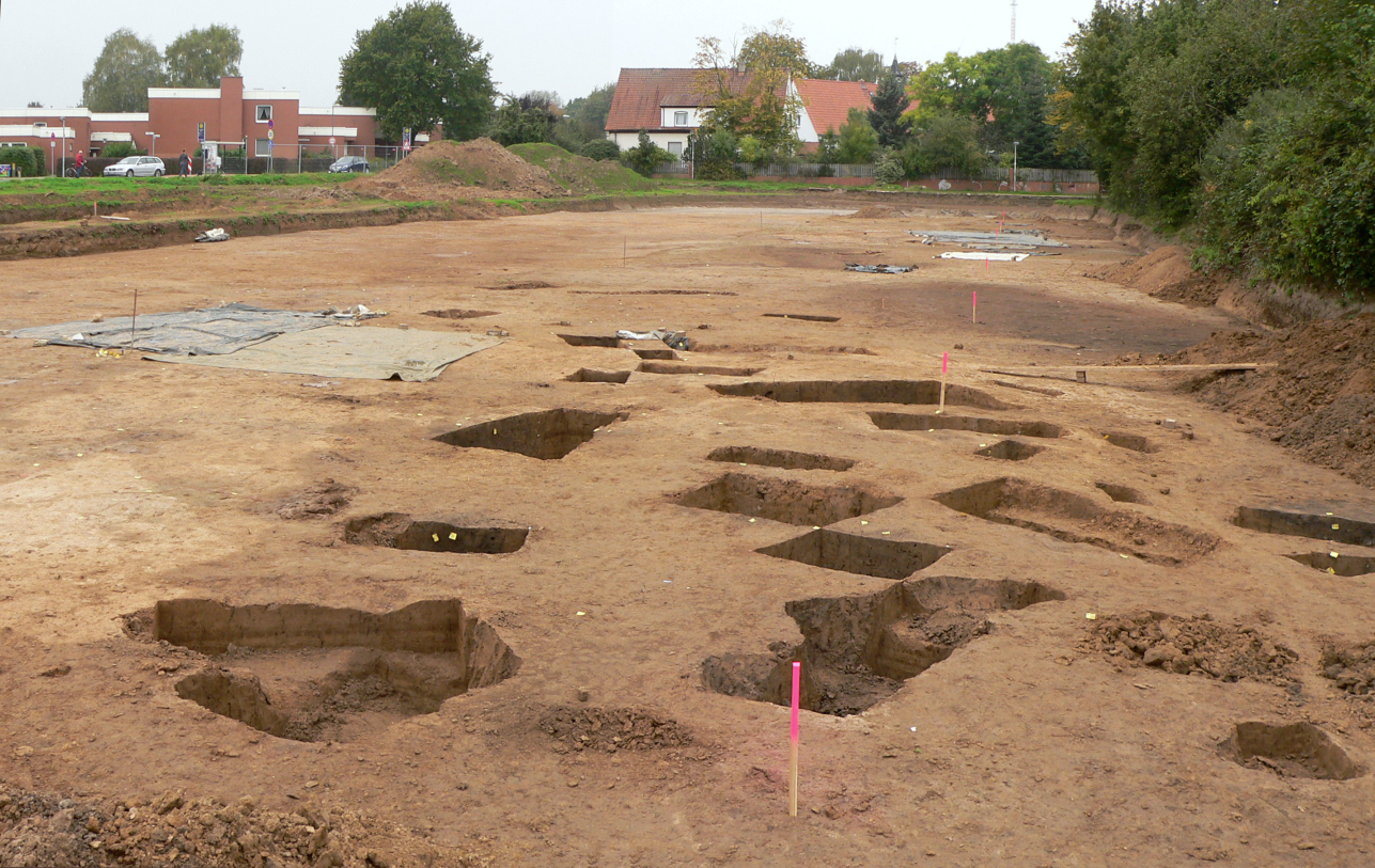 Ausgrabung auf dem früheren Siedlungsbereich von Klein Hemmingen